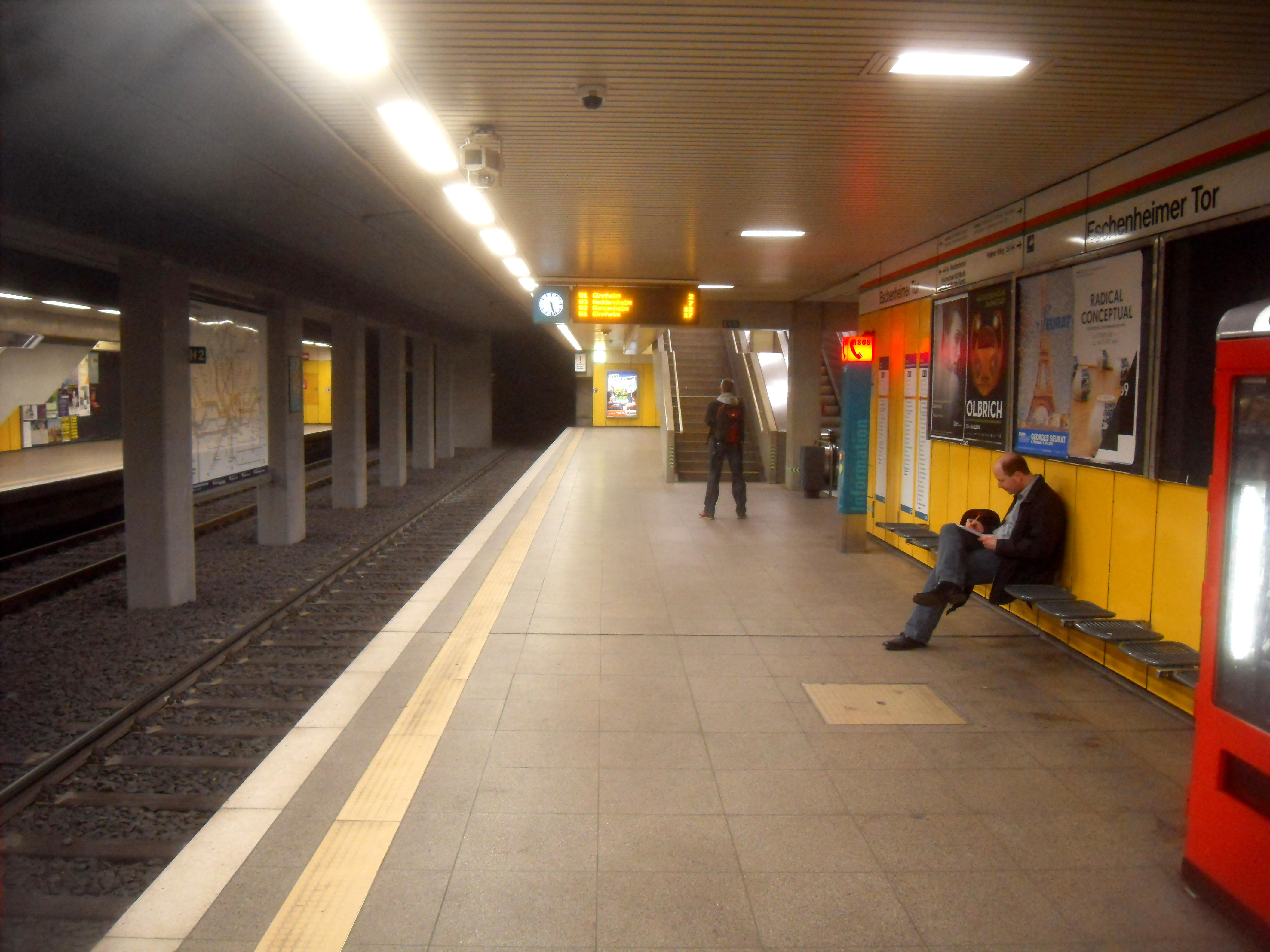 Bahnsteig des U-Bahnhofs Eschenheimer Tor(Richtung Ginnheim, Gonzenheim, Hohemark) der U-Bahn Frankfurt auf den Linien U 1 bis U 3 in Hessen (Deutschland)